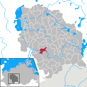 Damm in Mecklenburg-Vorpommern - District Parchim